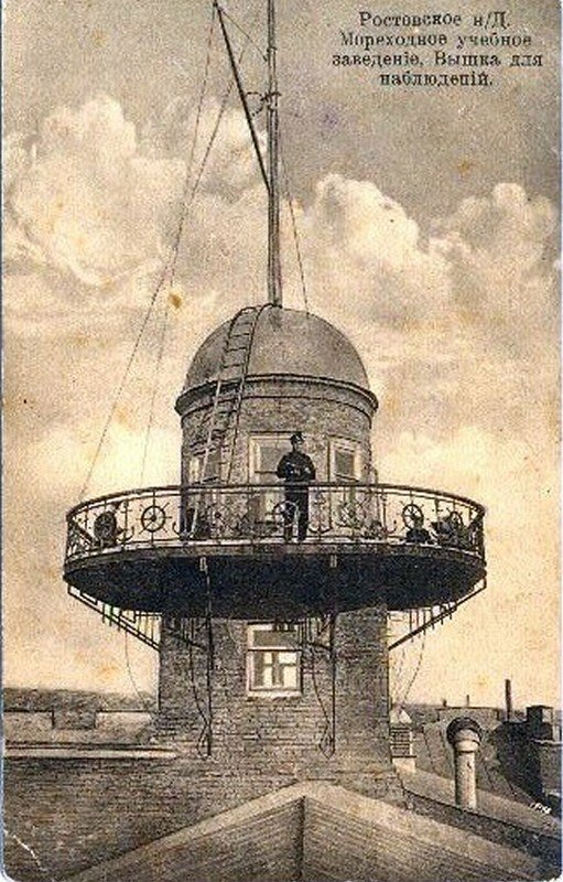 Ростовское Мореходное училище. Вышка для наблюдения